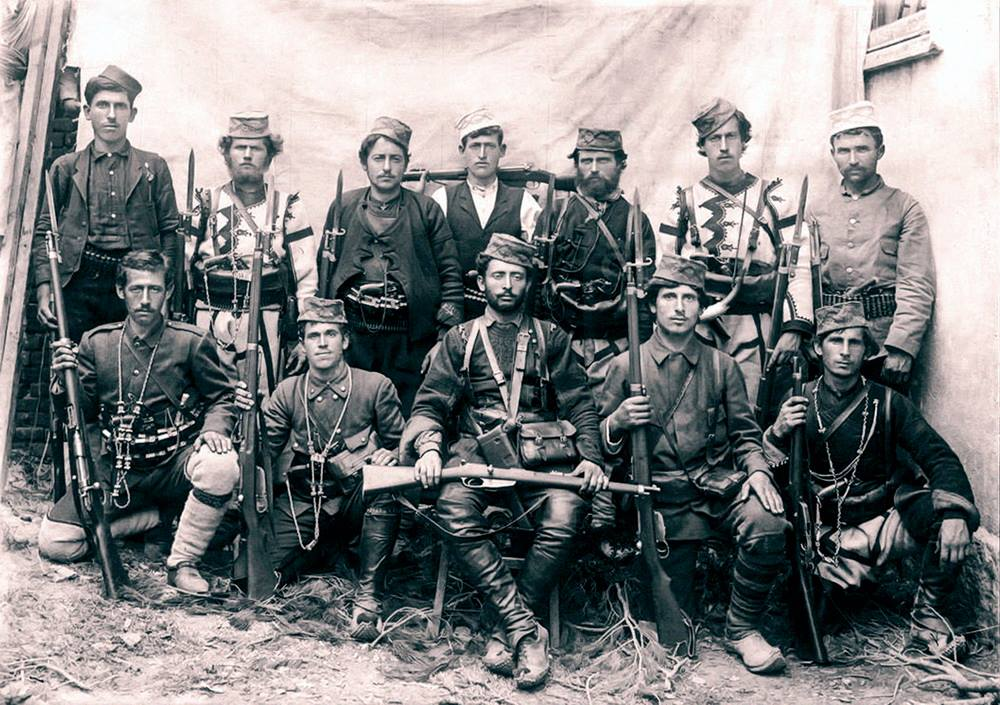 Иван Чакулев.